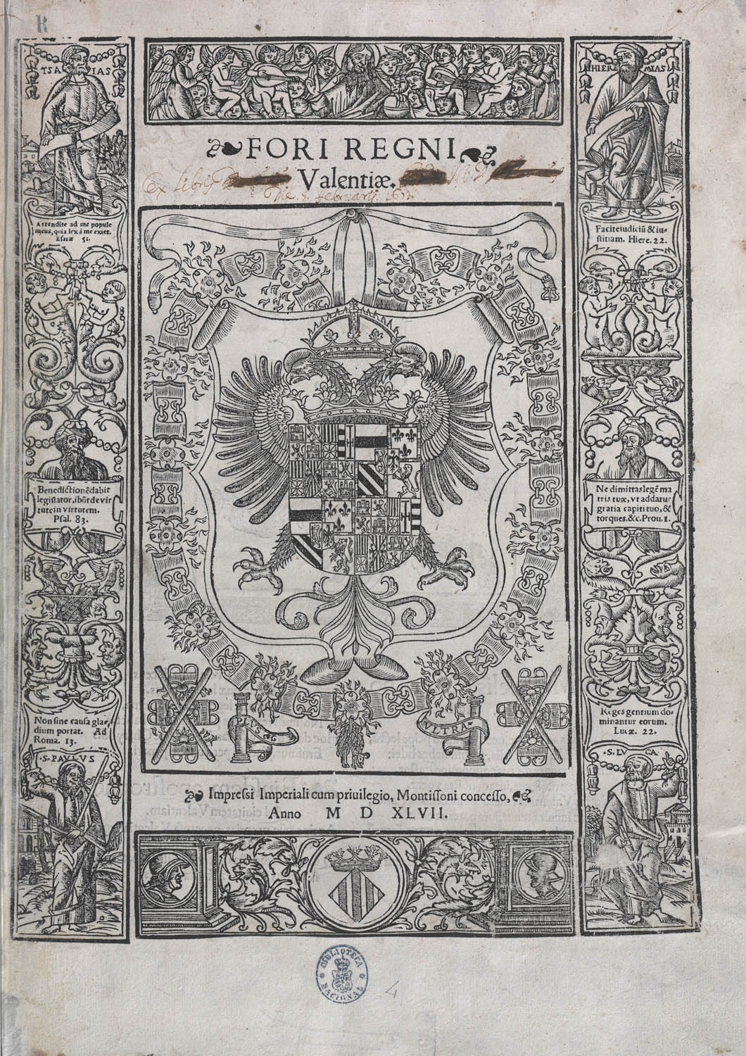 Portada del primer volum dels "Fori Regni Valentiae". Impressum in … ciuitate Valentia: arte ac industria … Ioannis de Mey Flandri, 1547 (1548)